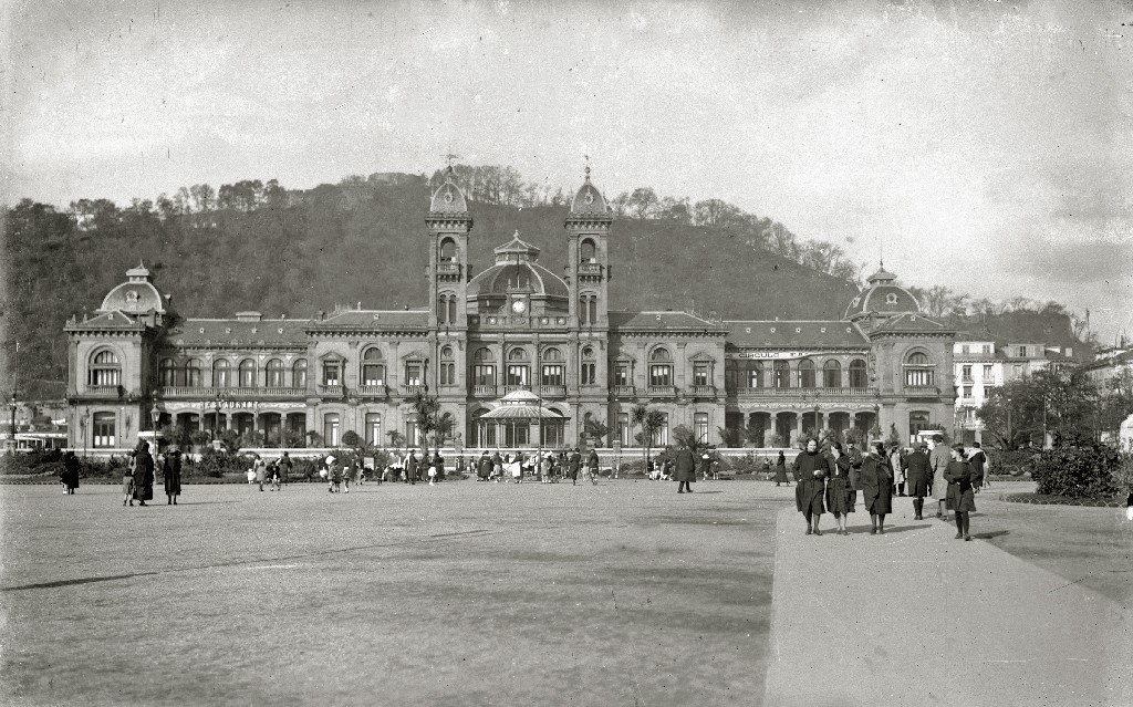 Título original: El Gran Casino de San Sebastián (1/2) Localización: San Sebastián (Guipúzcoa)